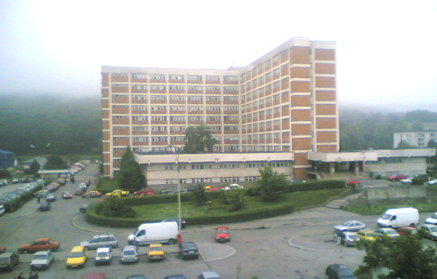 Spitalul judetean din Targu Mures